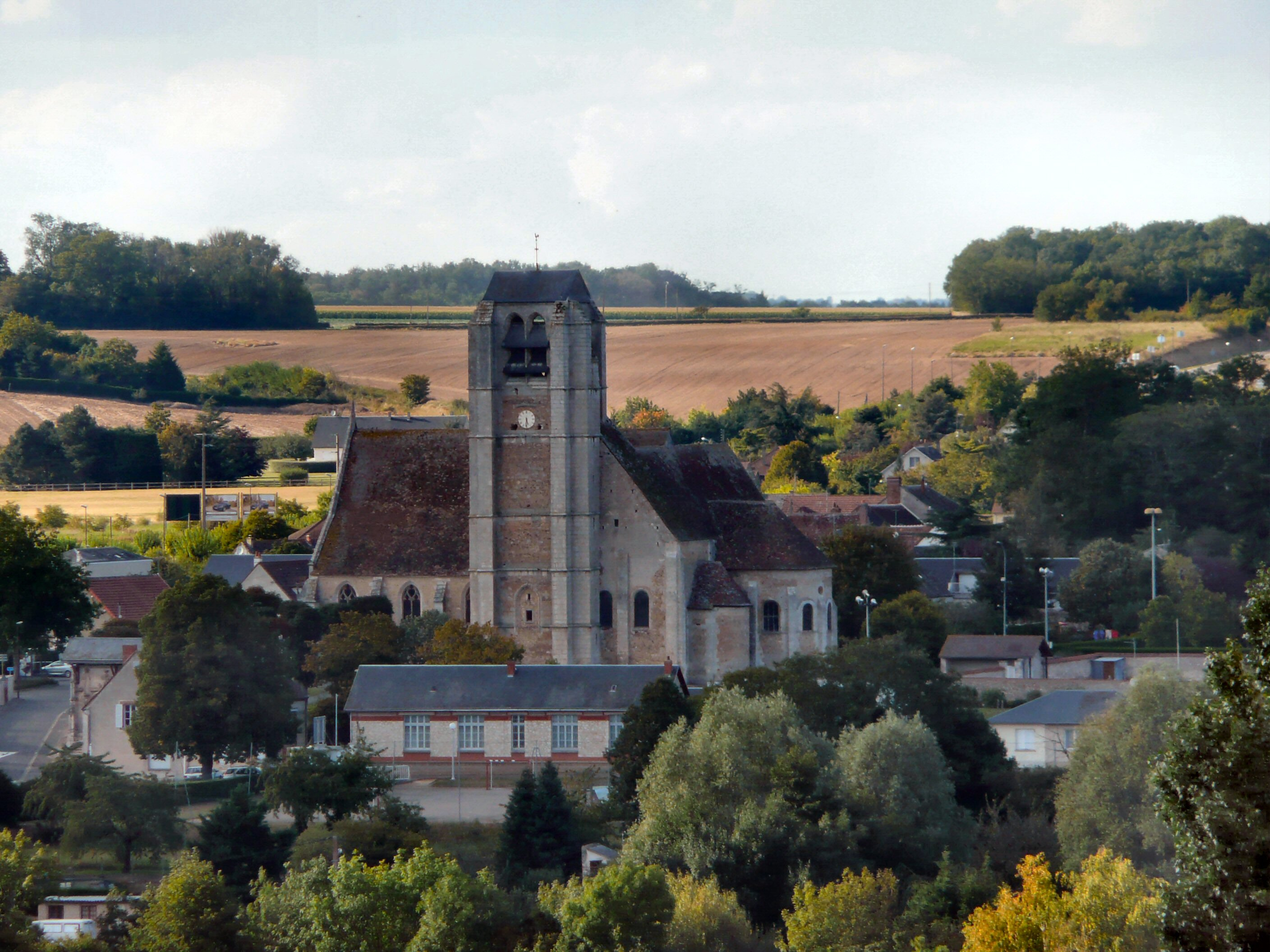 Châteaudun - Église Saint-Jean de la Chaîne, Eure-et-Loir, France.